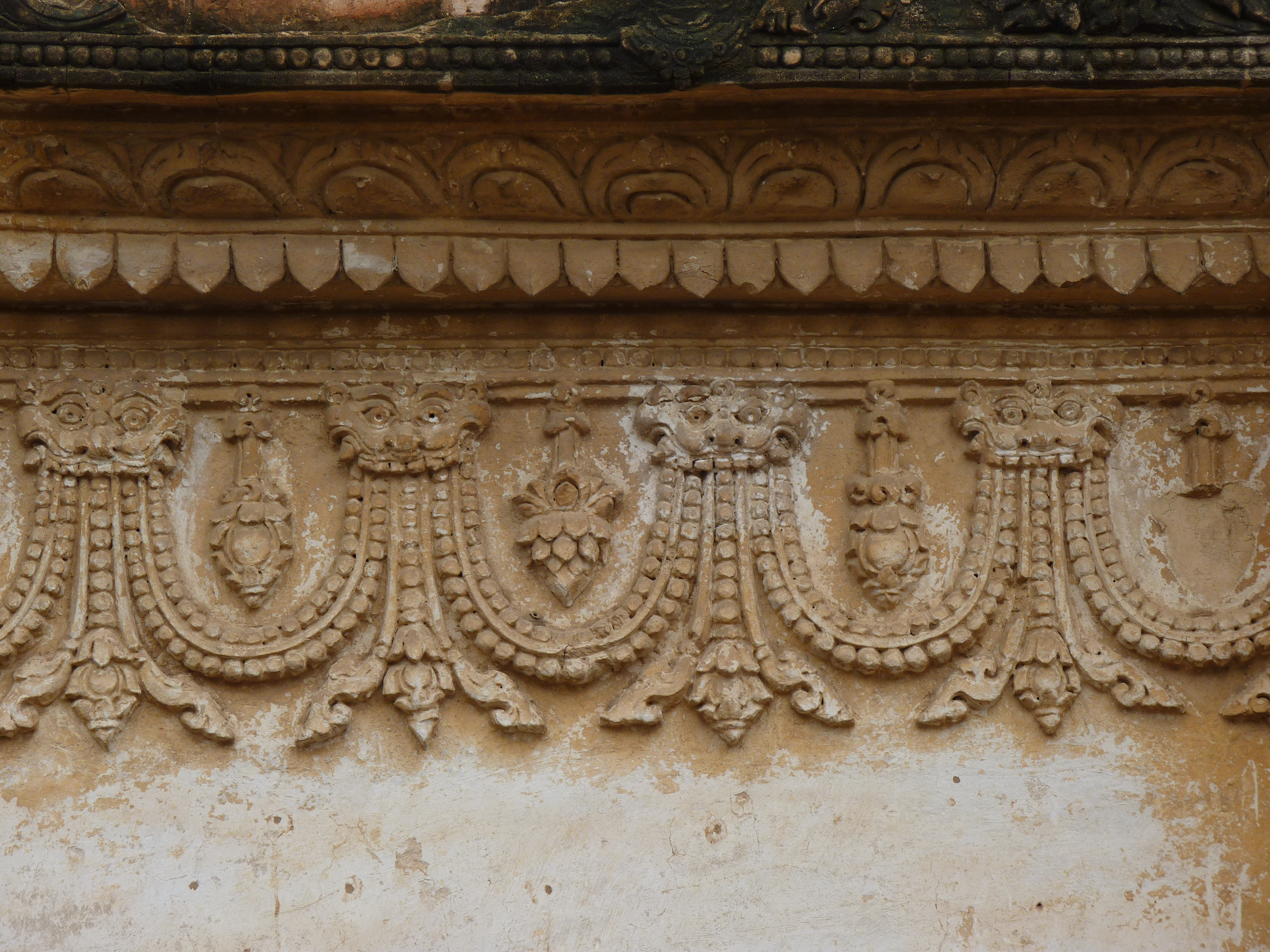 Rangée de faces monstrueuses apotropaïques crachant des anses perlées sur le Kubyauk-gyi